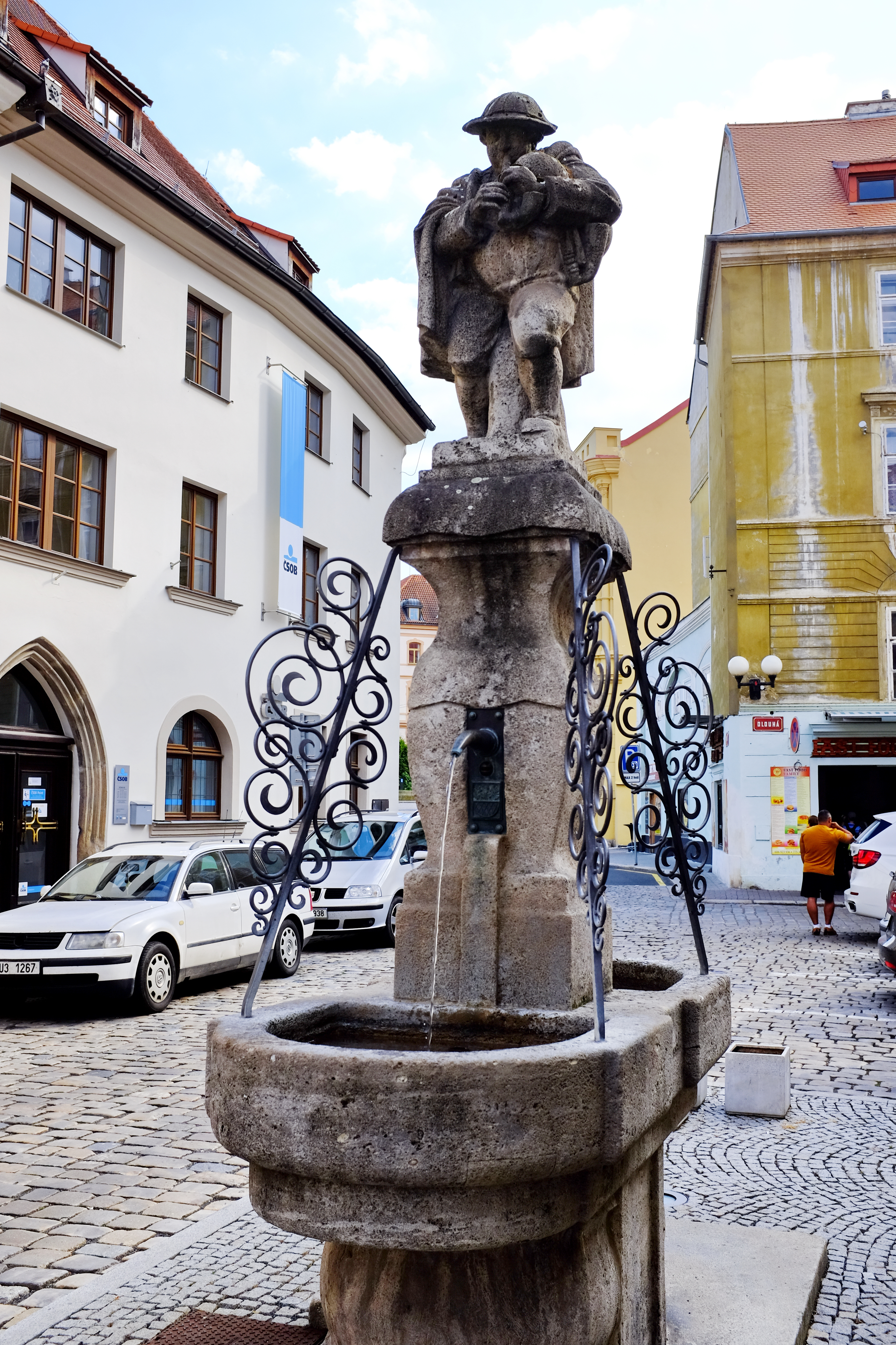 Cheb, kašna se sochou dudáka v Březinově ulici